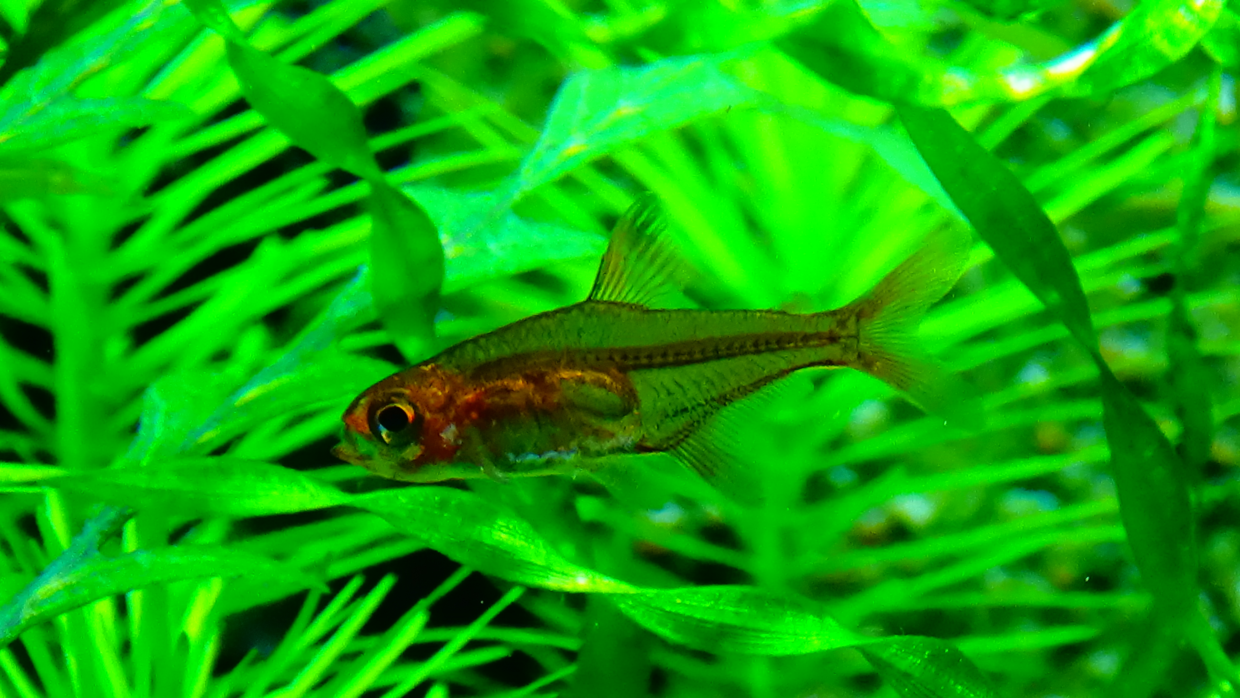 Hyphessobrycon amandae - Aquarium Tropical du Palais de la Porte Dorée Paris/France - 05/2015